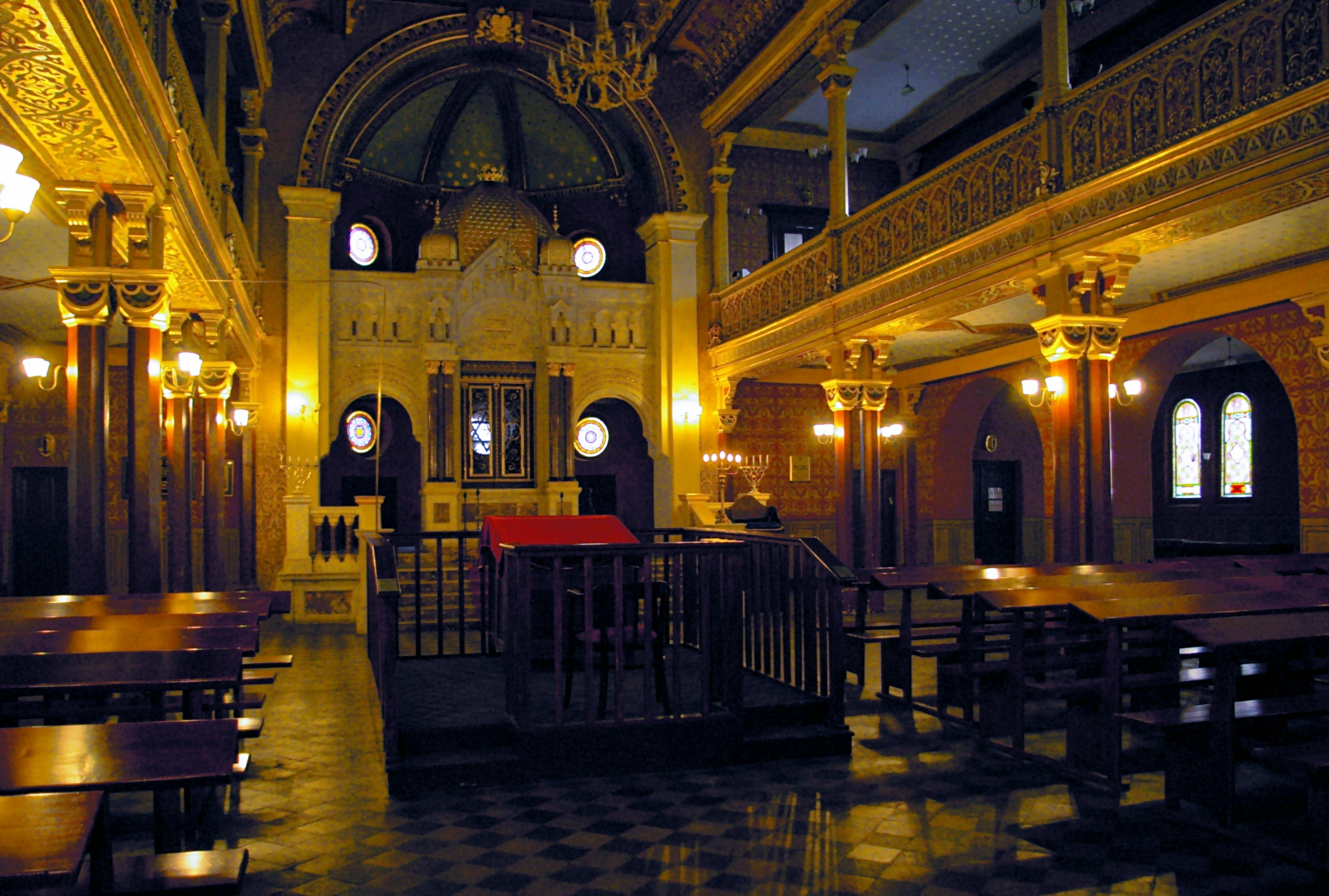 Wnętrze Synagogi Tempel w Krakowie